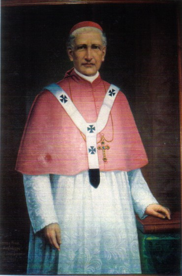 Mons. José Ignacio Ordoñez, arzobispo de Quito entre 1882 y 1893.